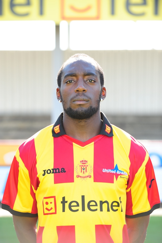 Joachim Mununga